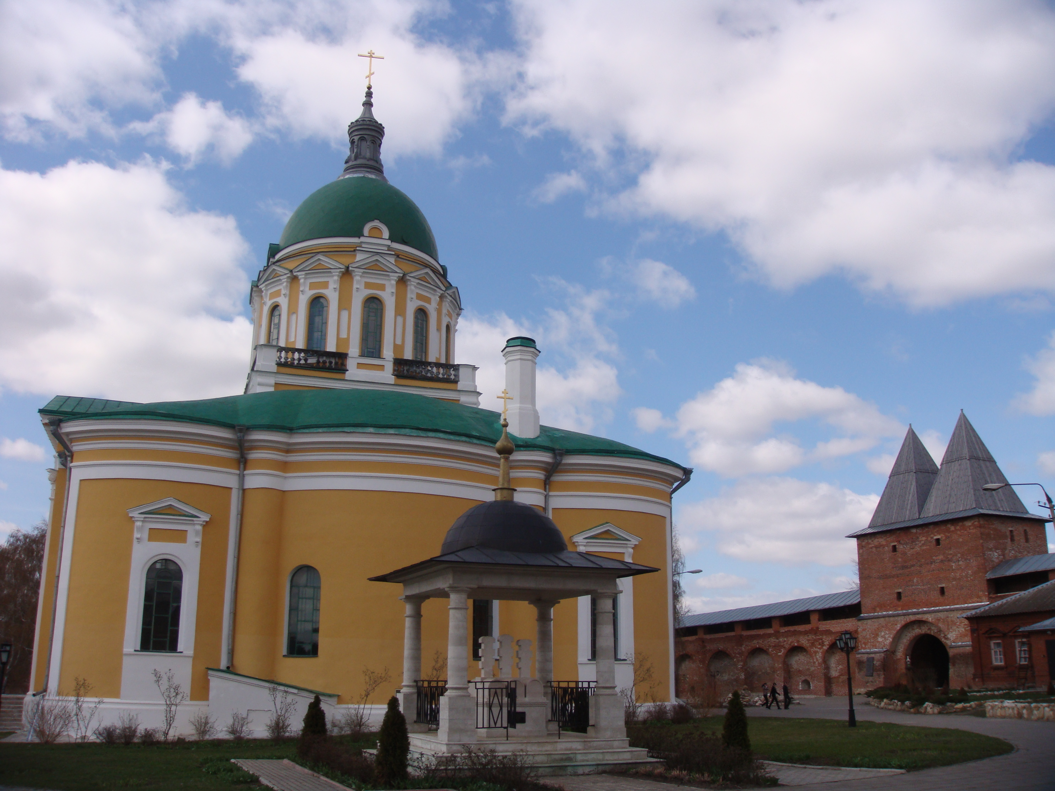 Усыпальница князя Федора Зарайского